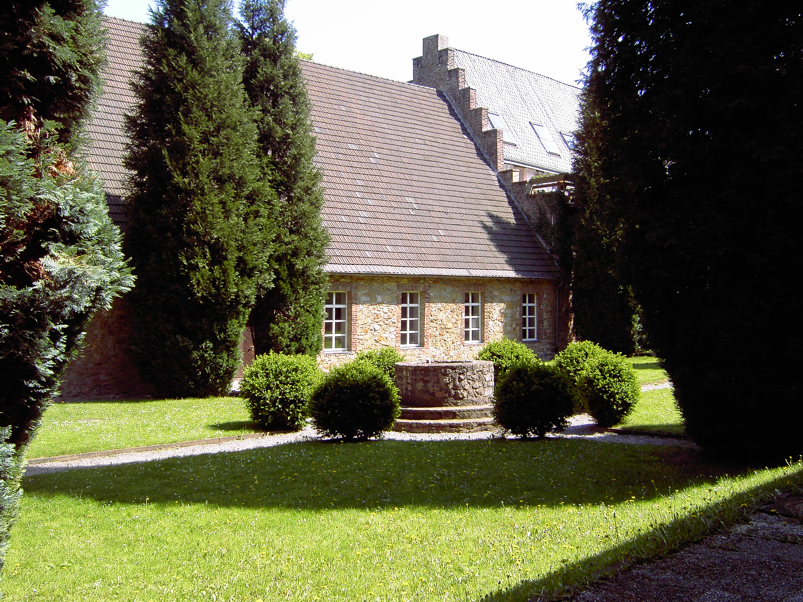 Innenhof der ehemaligen Klosters und der jetzigen Pfarrkirche St. Katharina (Wenau)